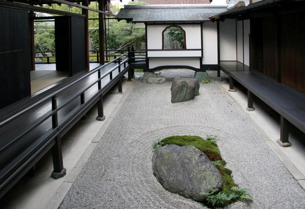 大徳寺塔頭 黄梅院の枯山水庭園です。